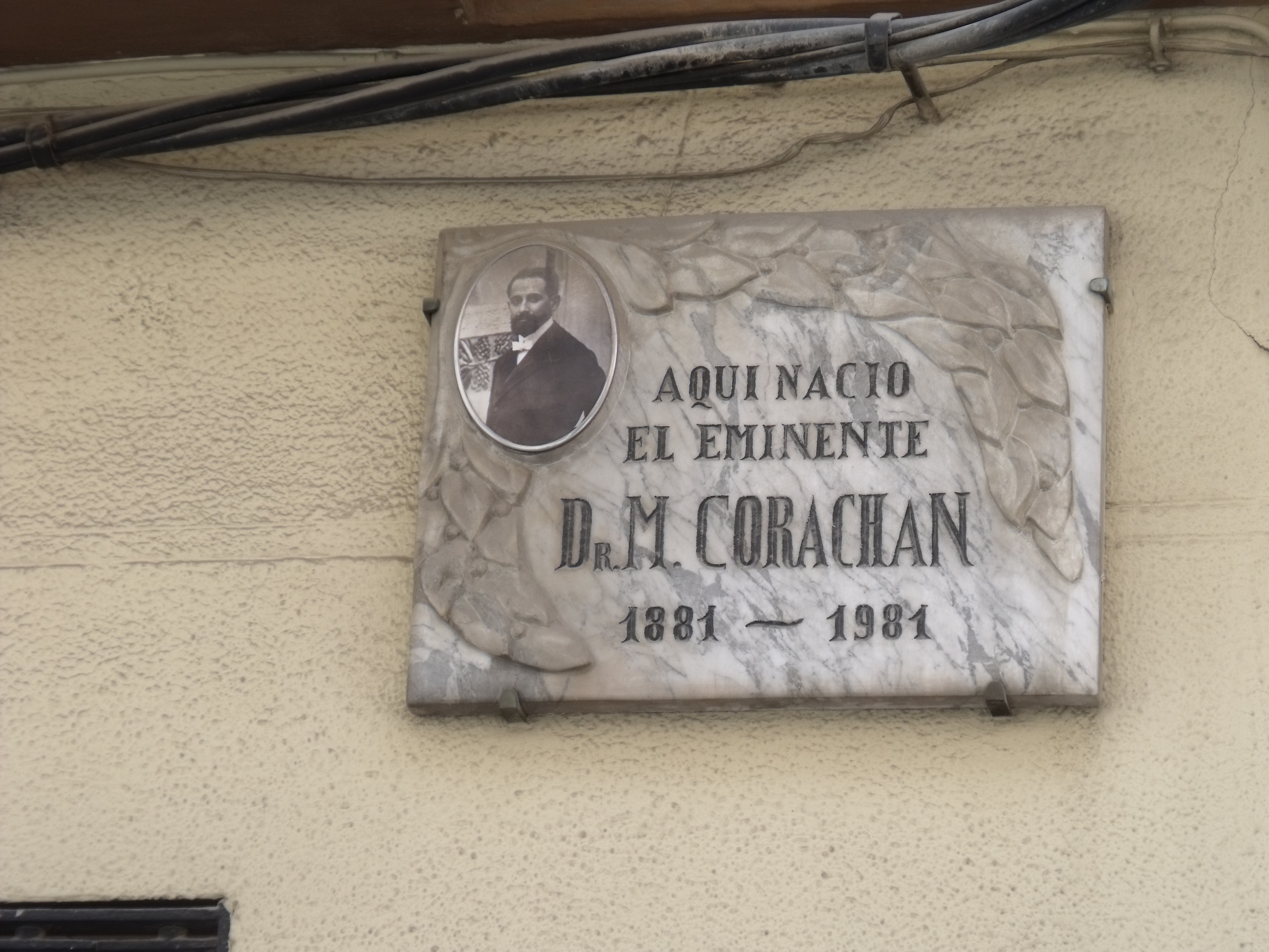 Casa natal de Manuel Corachán. Chiva (Valencia).